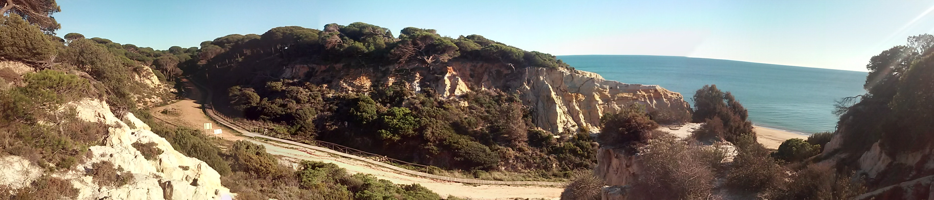 Panorámica playa de Rompeculos. Enero de 2017